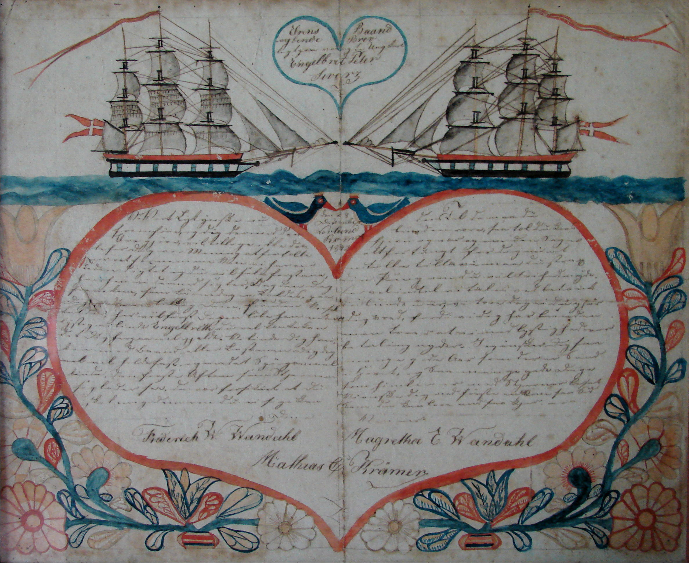 Bindebrev, Kommandørgården på Rømø, Jylland